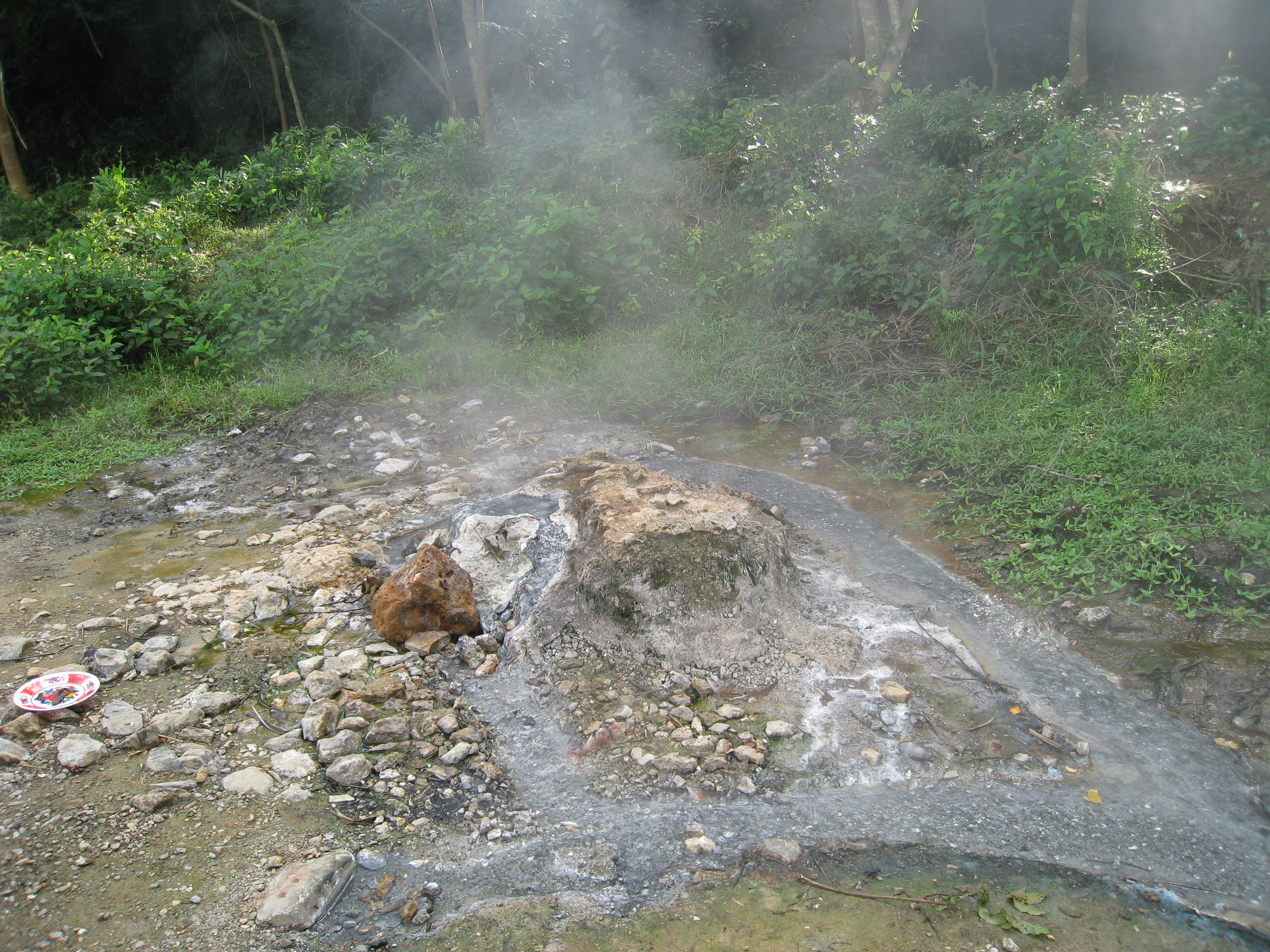 Bang Spa in Quang Binh, Vietnam